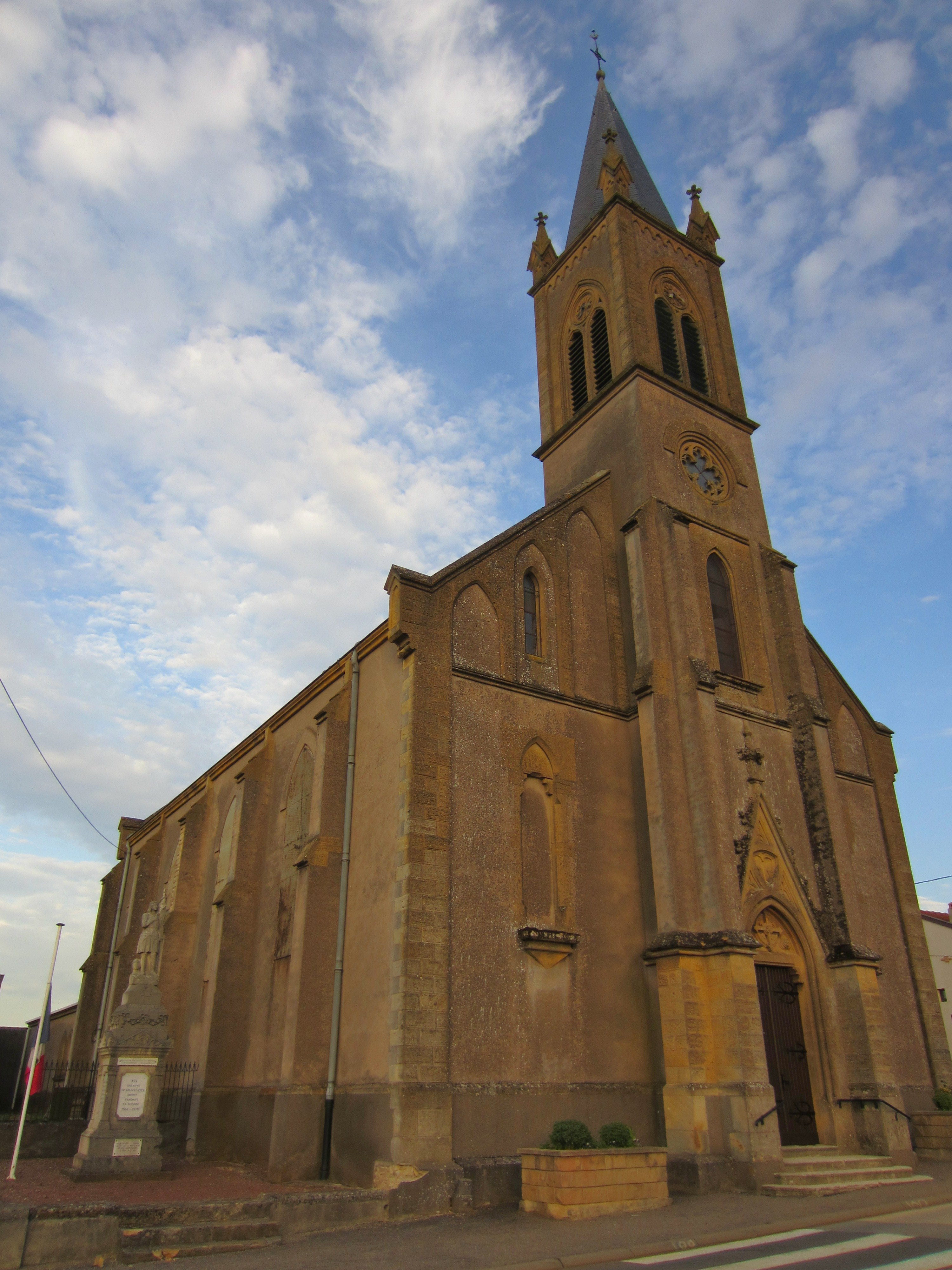 Description église Saint-Léonard Gravelotte Date2 September 2011Sourcemon appareil photoAuthorAimelaimePermission(Reusing this file) église Saint-Léonard Gravelotte